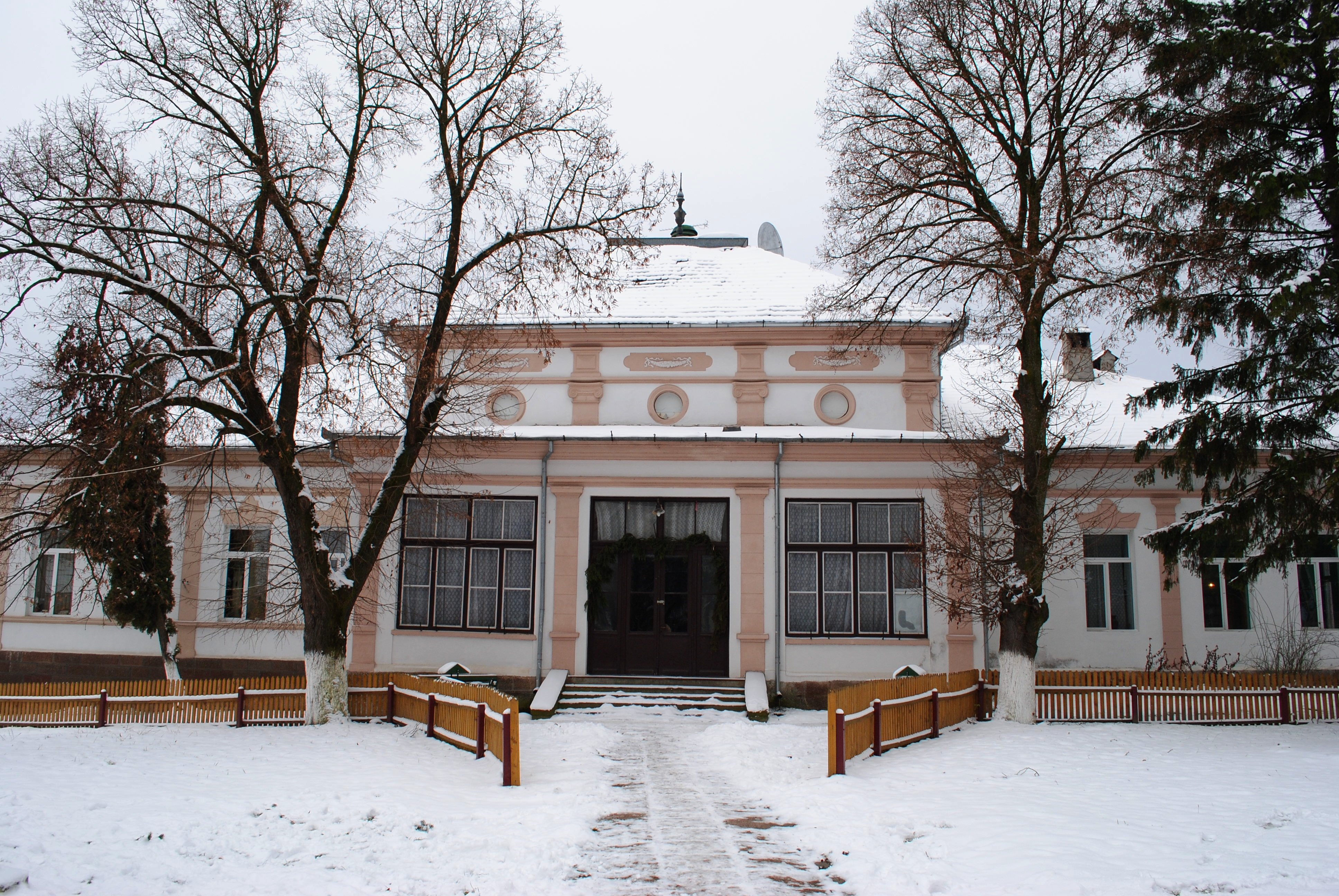 Clădire primărie, sf. sec. XIX